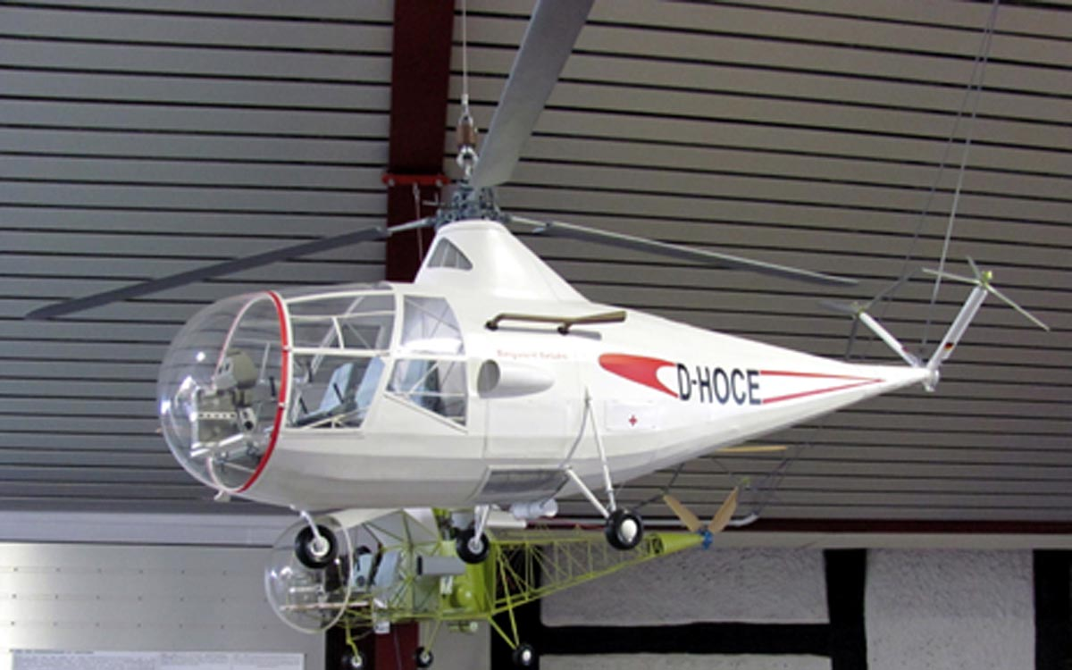 Modell des Borgward-Focke BFK-1 Kolibri im Maßstab 1 : 4,6 im Hubschraubermuseum Bückeburg